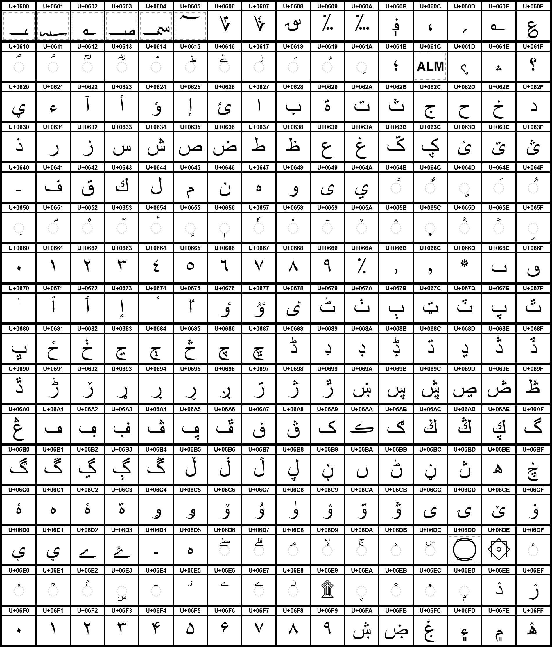 Grafiktafel für den Unicodeblock Arabisch. Einfach schraffierte Felder sind unbesetzte Codepoints, doppelt schraffierte Felder sind Formatierzeichen.